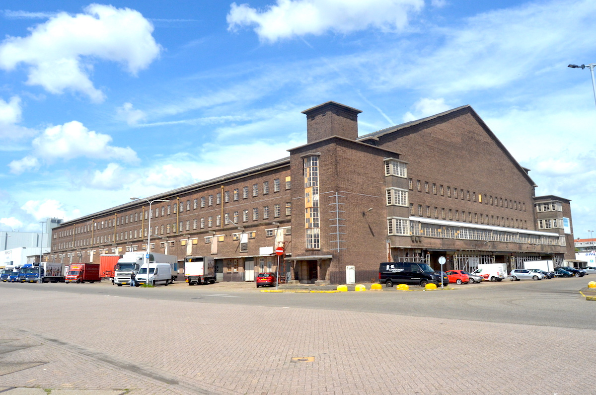 Centrale Markthal te Amsterdam-West - exterieur (1); juni 2019. Foto: Erik Swierstra.